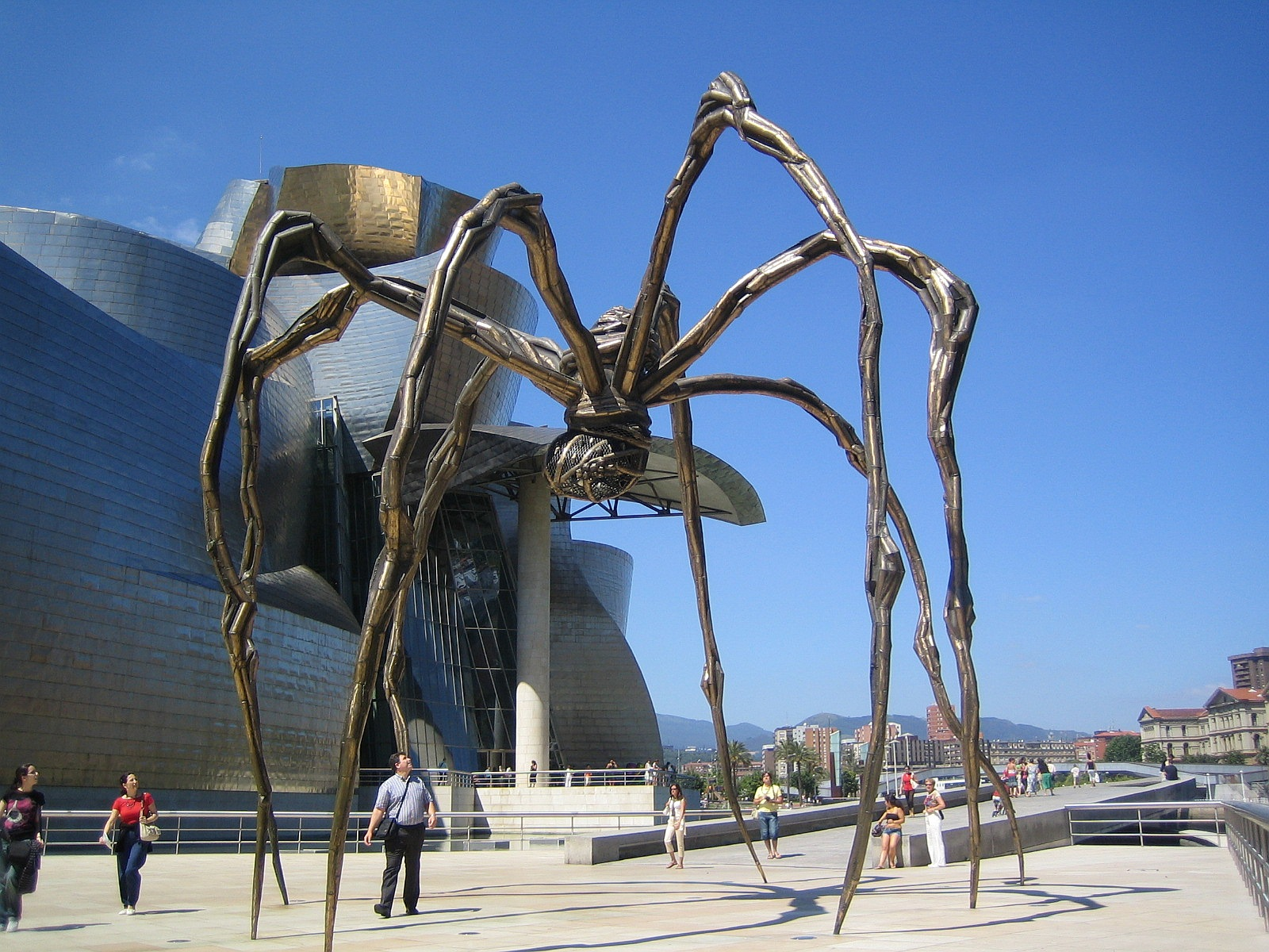 Sculpture Araignée Maman de Louise Bourgeois sur le site du Musée Guggenheim à Bilbao EspagneThe spider sculpture Maman by Louise Bourgeois outside the Guggenheim Museum Bilbao Spain.